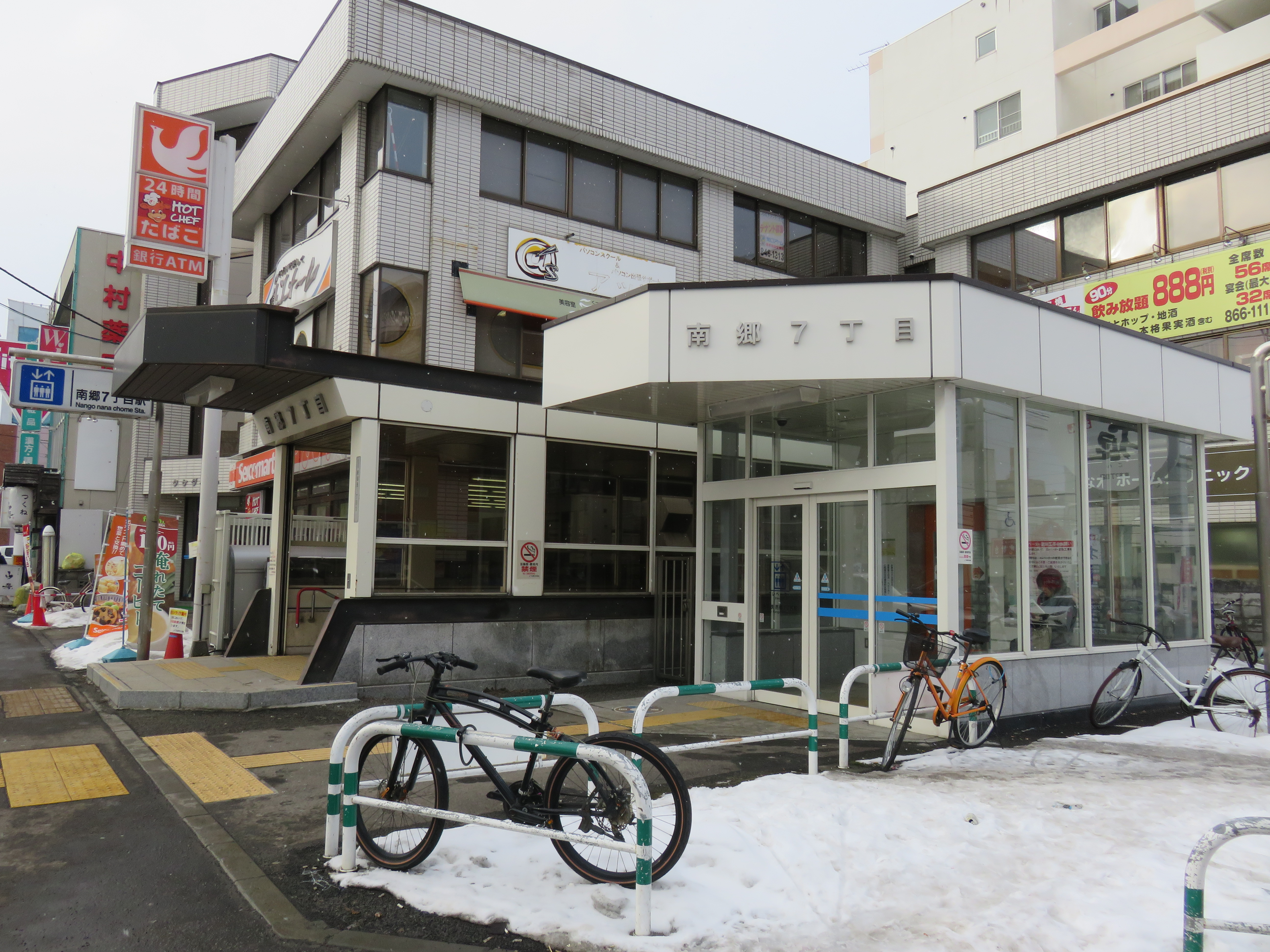 南郷7丁目駅3番出入口